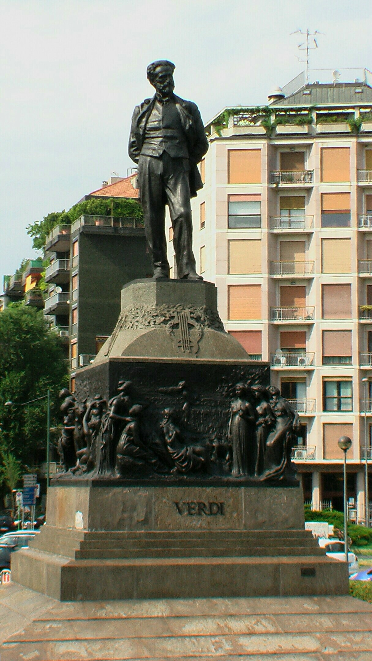 Verdi, Mailand